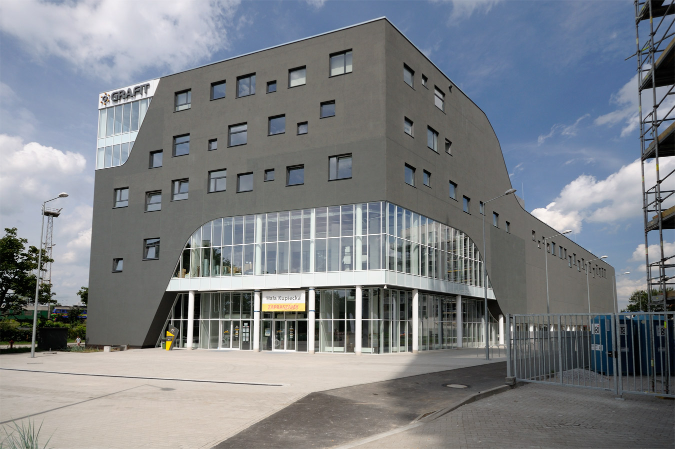 Budynek Centrum Biznesu "Grafit" przy ul. Namysłowskiej 8